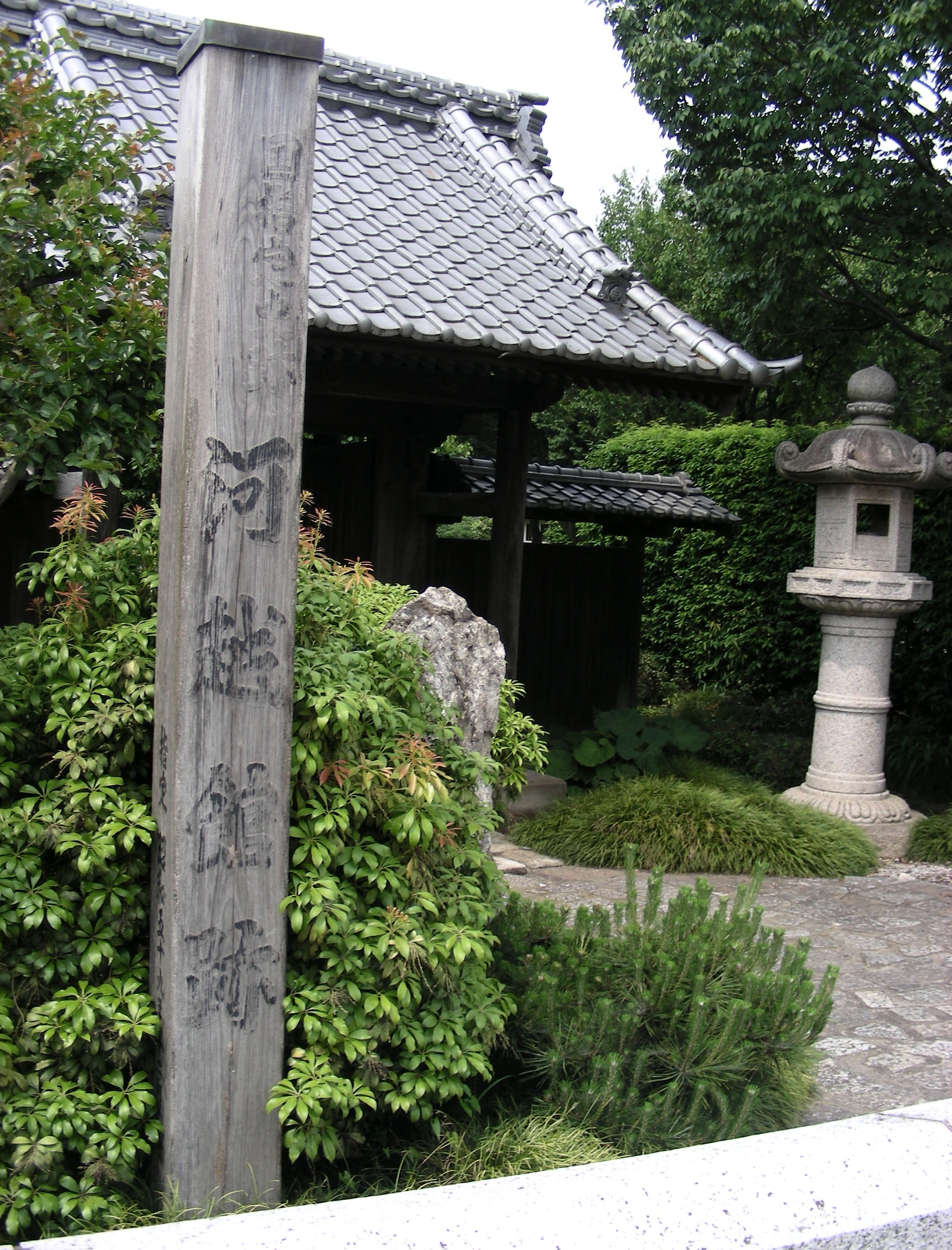 埼玉県川越市上戸の河越館跡の門。2008年6月上旬撮影